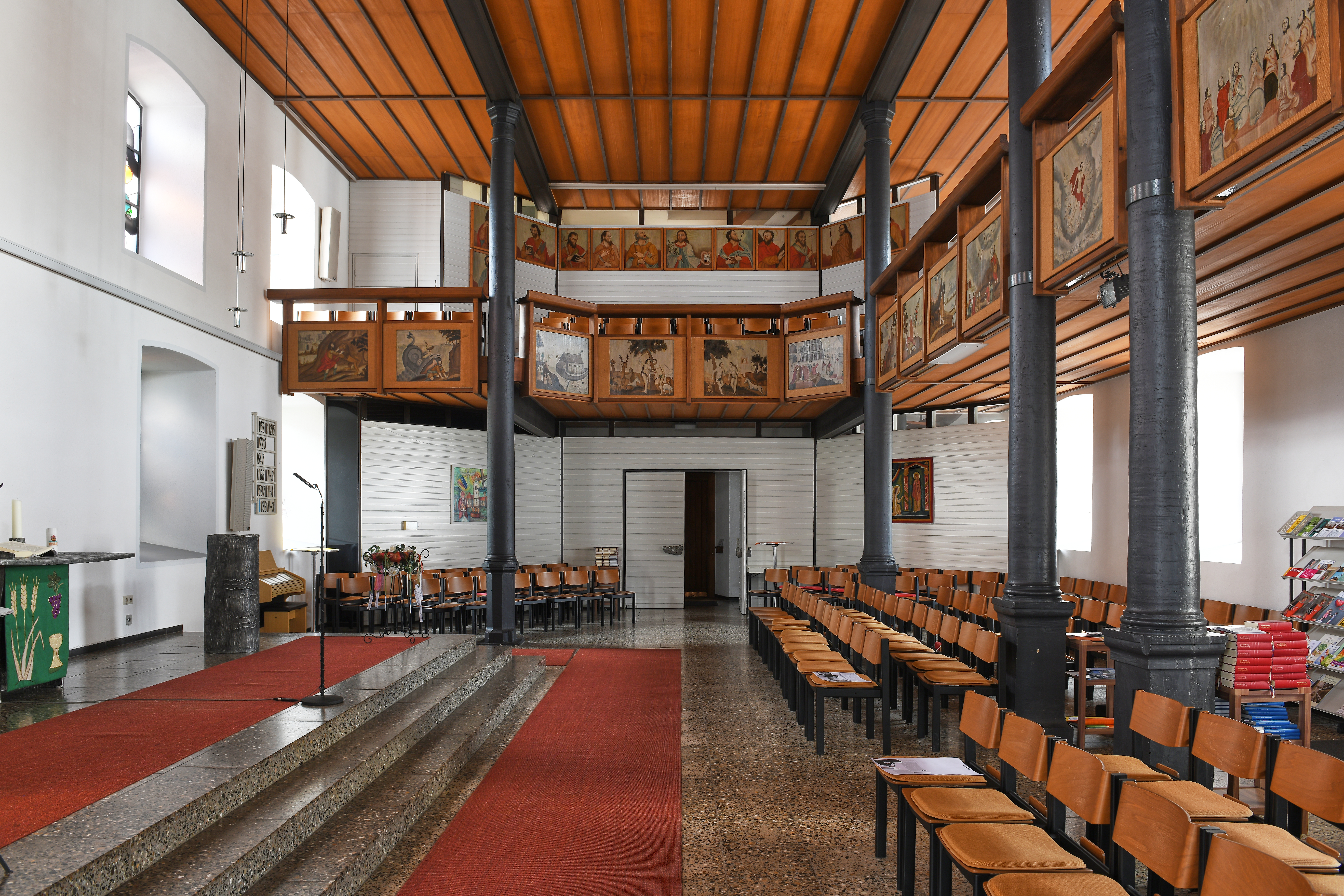 Hauinger Kirche: Sicht auf das Langhaus